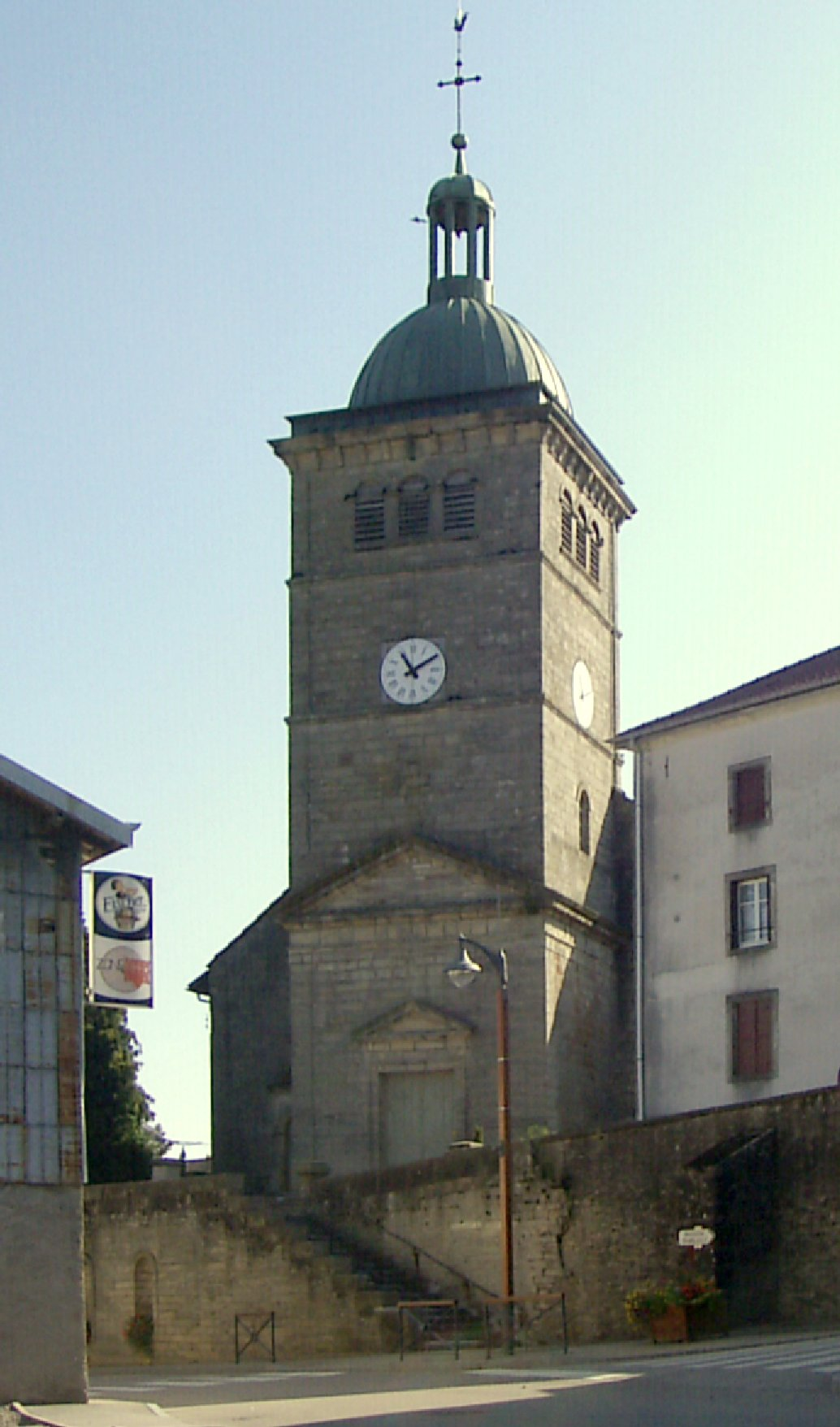 L'église Saint-Gengoult d'Hadol